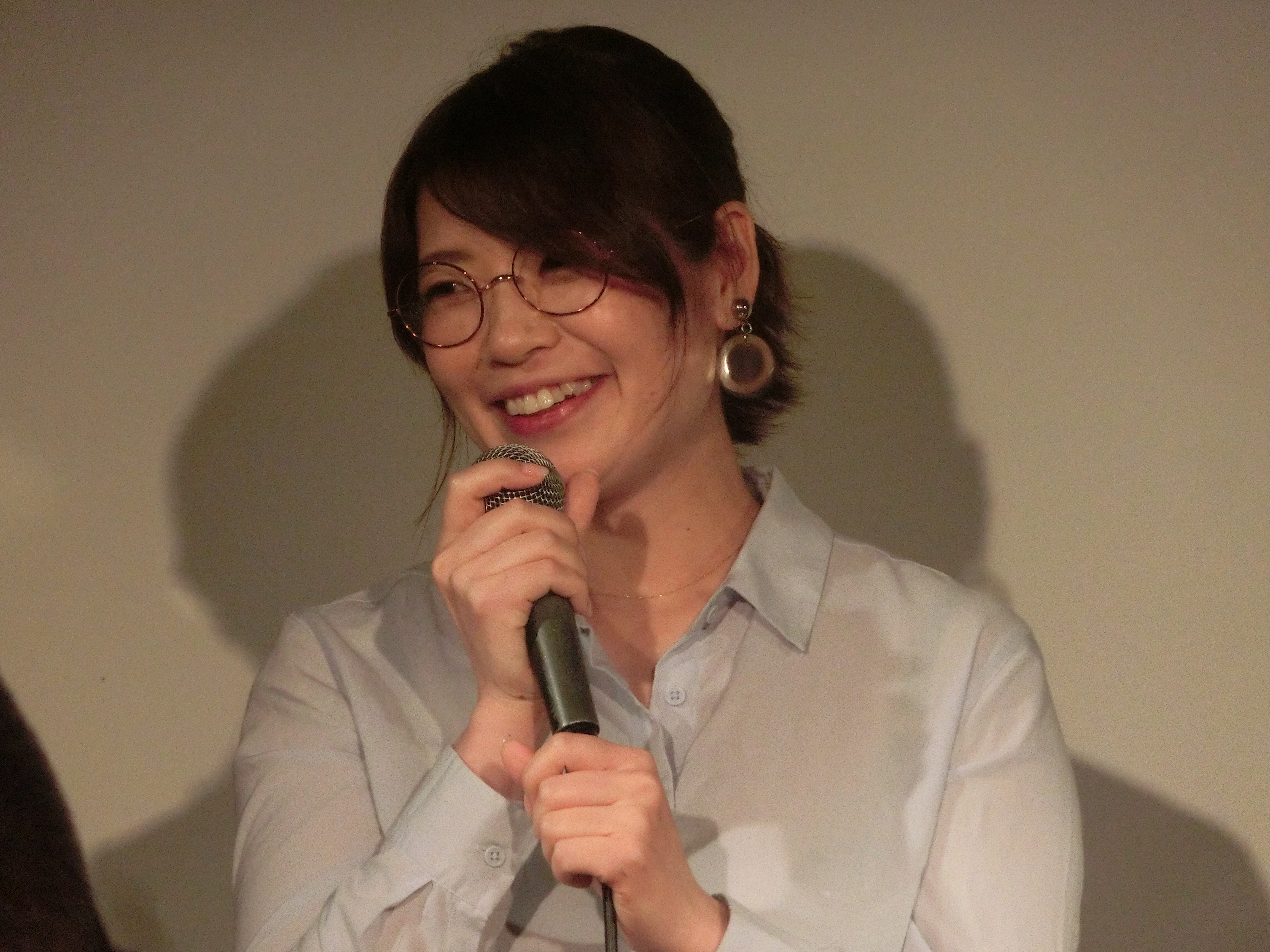 2019年10月6日、Adult video supporting actress prize